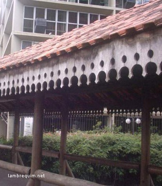 Lambrequim Curitiba - Paraná ( 2005 ) Autora: Maria Sidonea Utida Santos